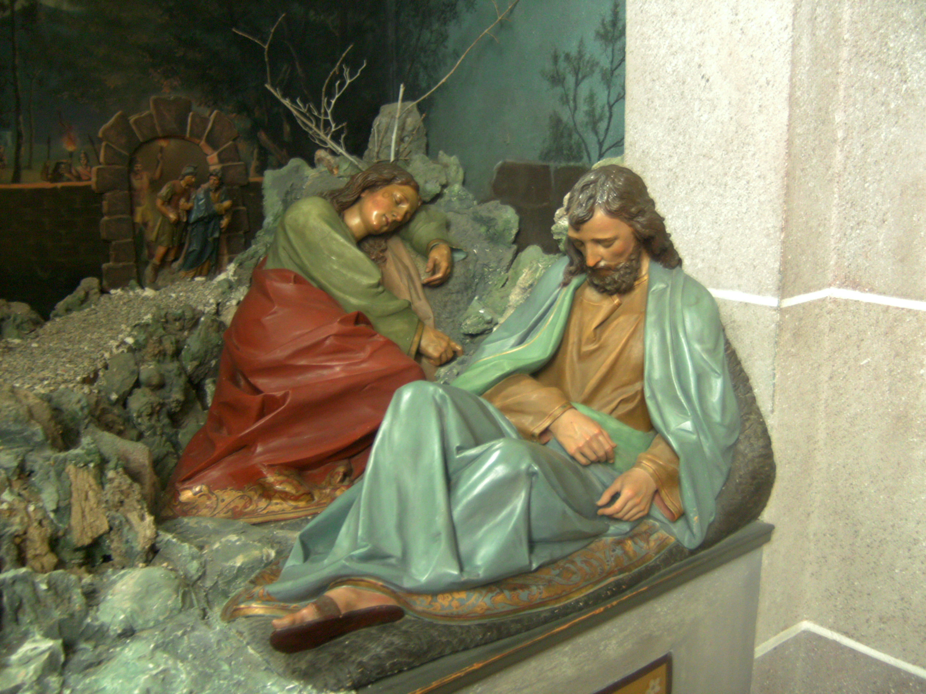 Kirche St. Martin in Kirchberg an der Iller - Ölbergszene